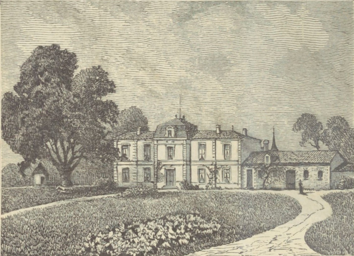 Illustration du Château Dauzac dans l'ouvrage Bordeaux et ses vins (7ème édition) de Charles Cocks et Edouard Féret publié en 1898